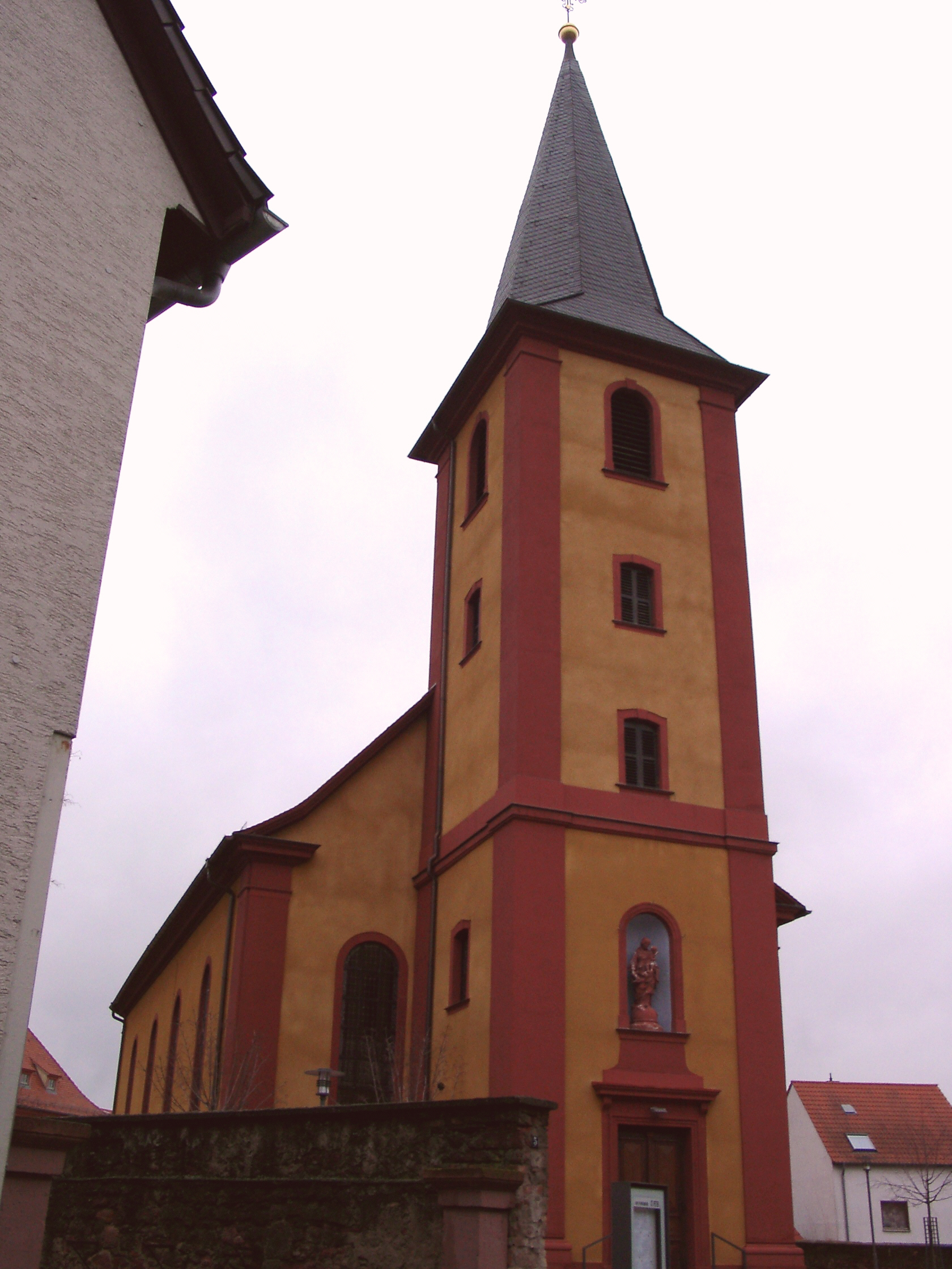 Ilvesheim, Katholische Kirche St. Peter